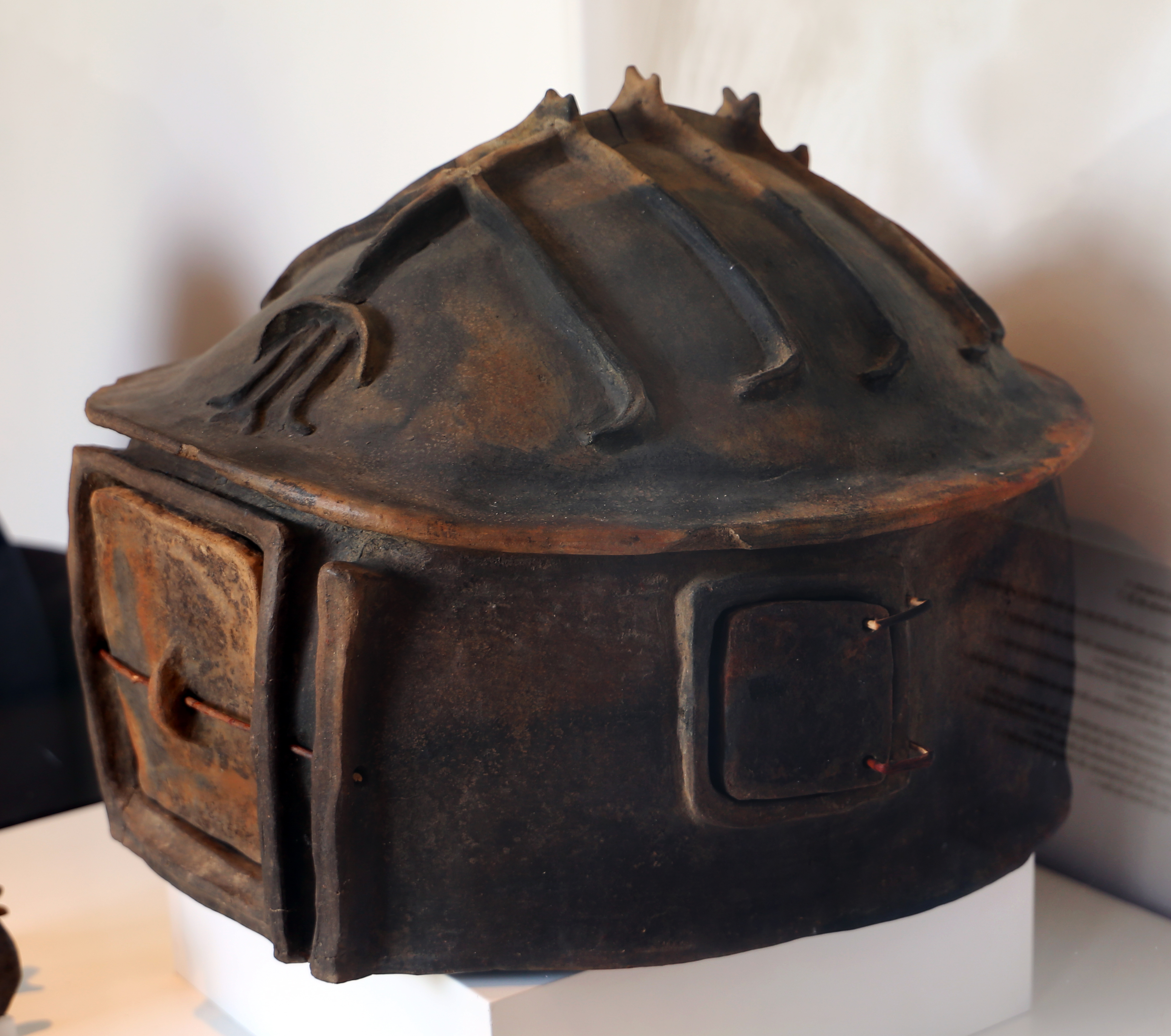 Palestra Grande This is a photo of a monument which is part of cultural heritage of Italy.